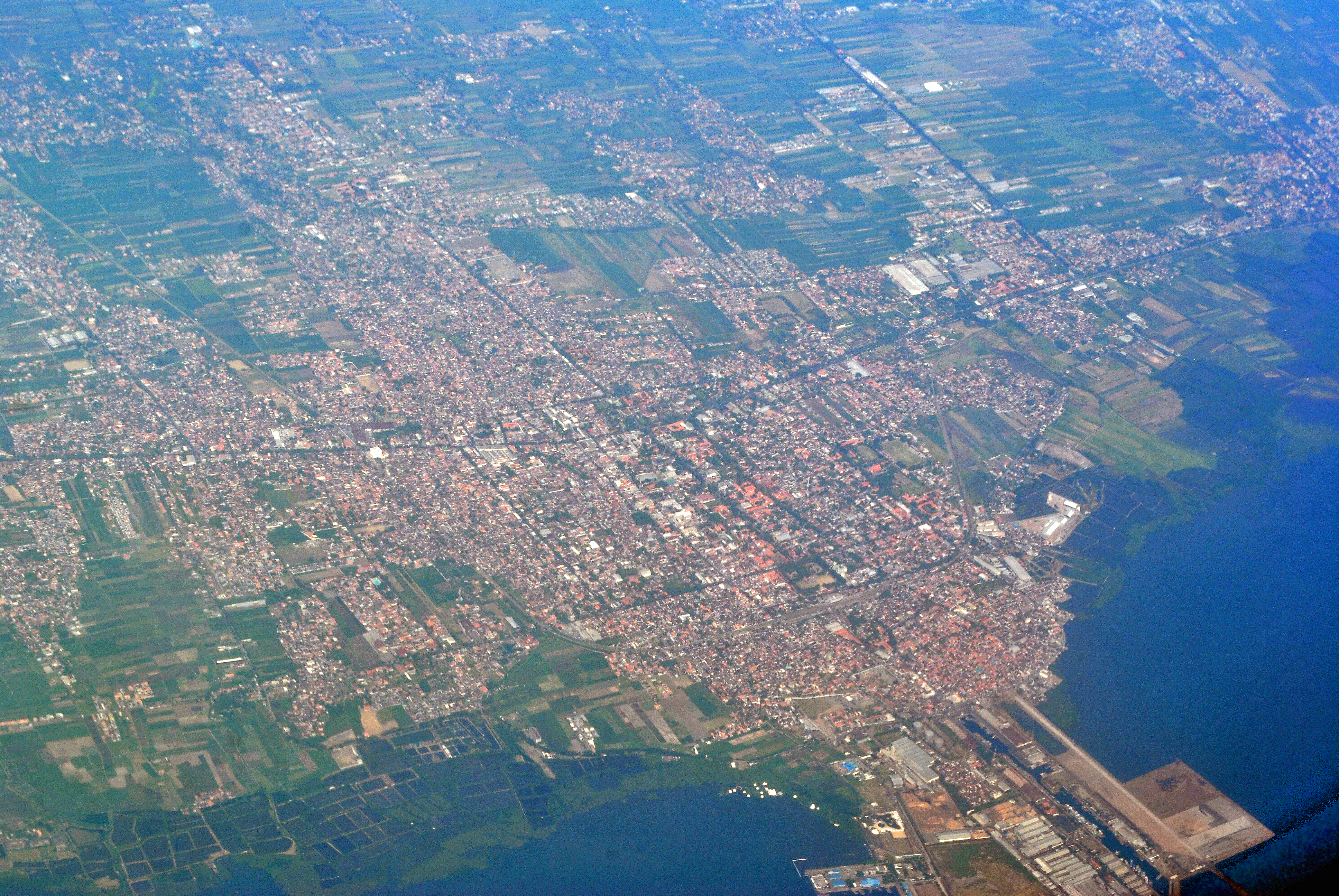 Probolinggo